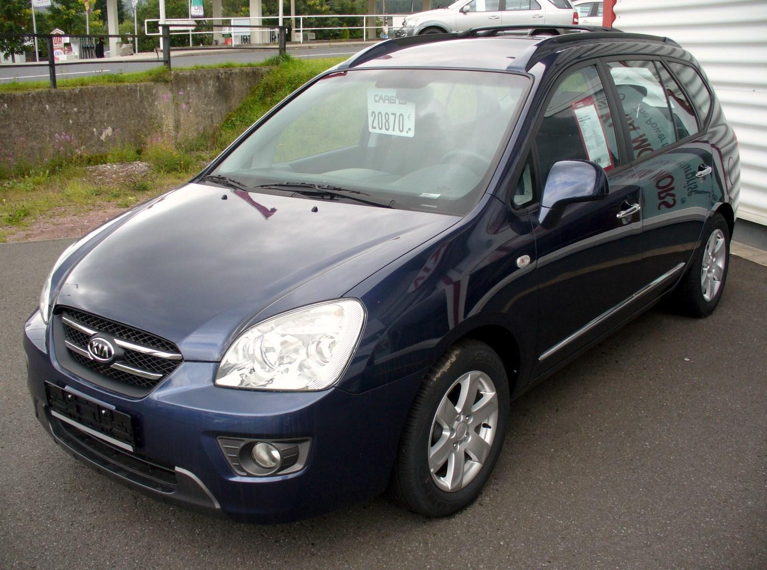 Kia Carens